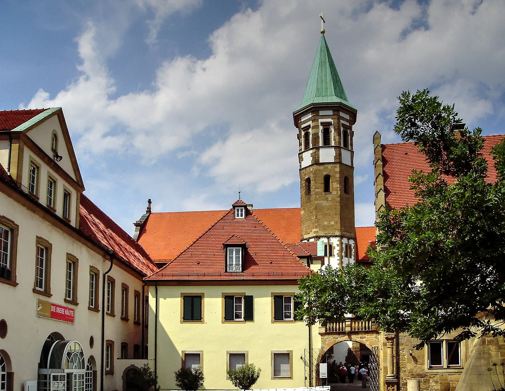 Minster "Deutsch-Ordens-Münster" of the City Heilbronn